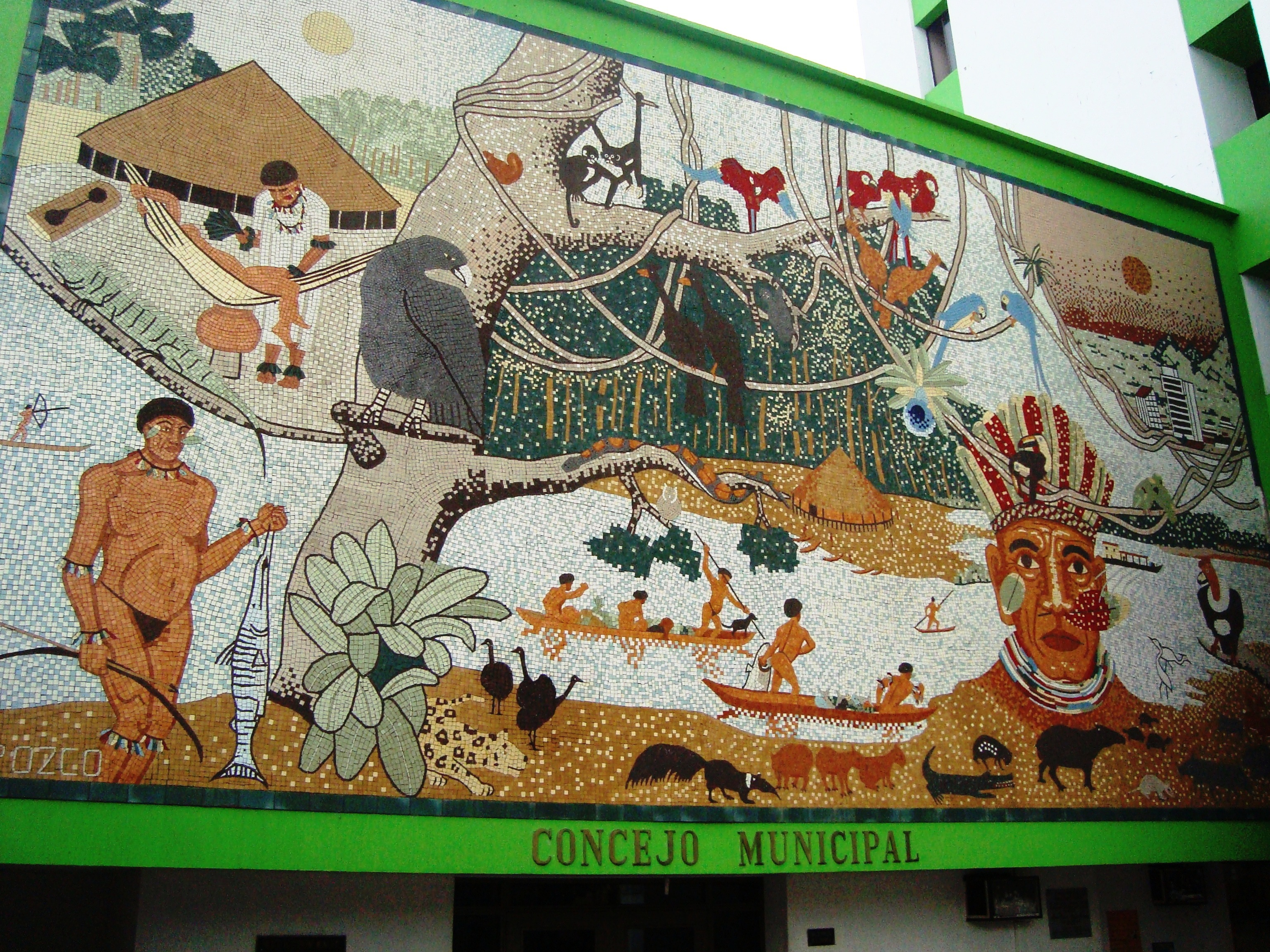 Mural Makatañú en Florencia (Caquetá)